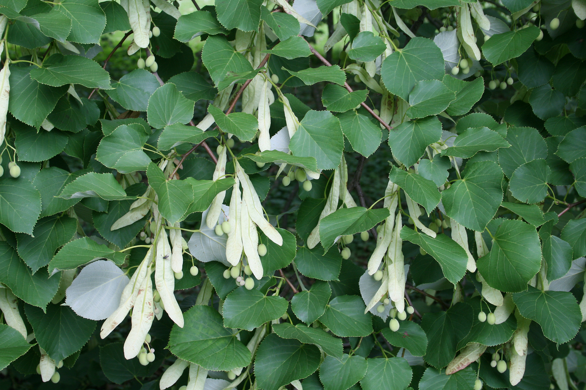 Feuilles du Tilia oliveri Position exacte : Meise (Belgique) – Jardin botanique National de Belgique.